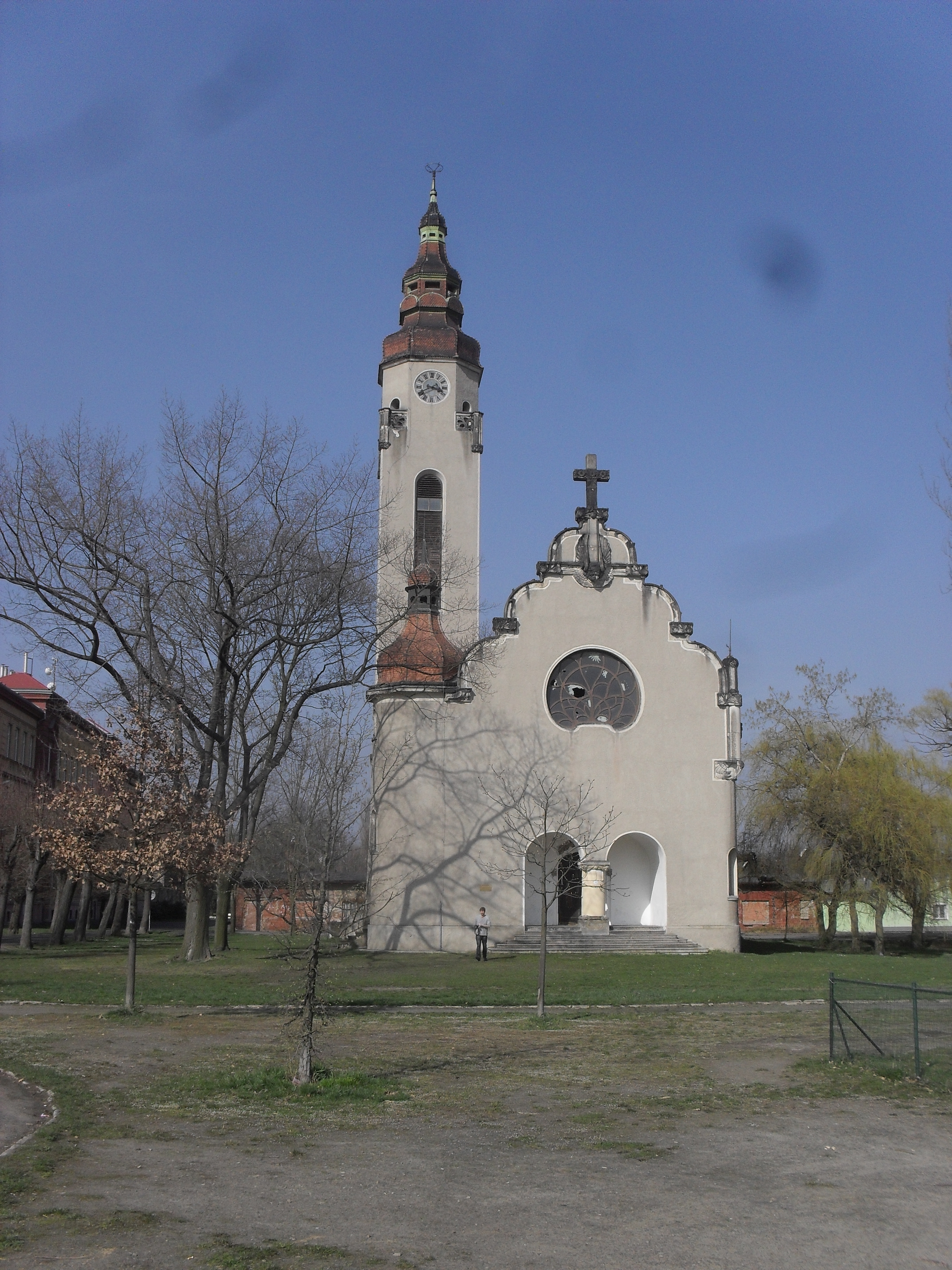 Duchcovský Kostel Církve československé husitské.